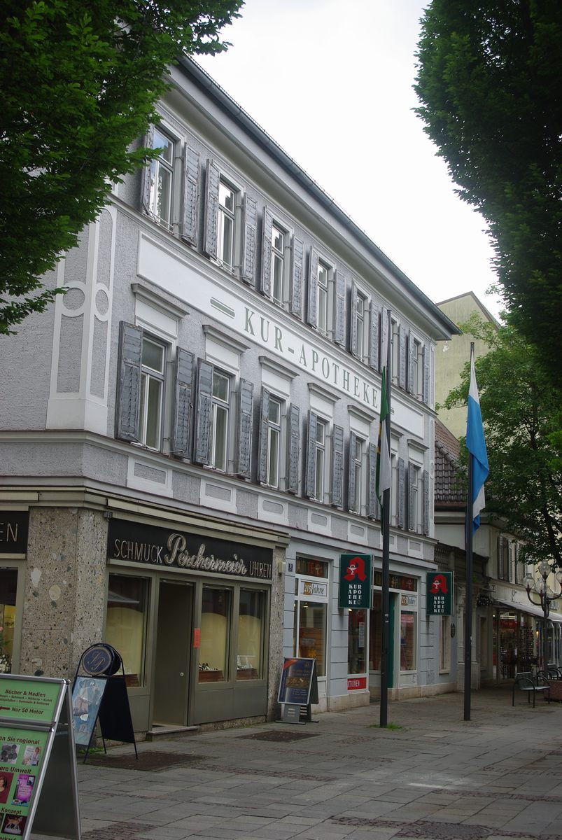 Kur-Apotheke in 83435 Bad Reichenhall